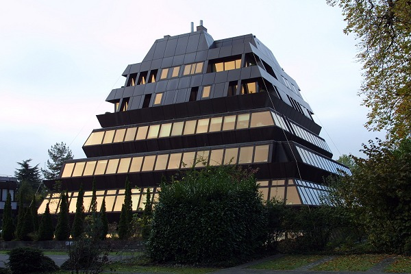 Ferrohaus Zürich (heute: Klinik Pyramide am See), Architekt Justus Dahinden